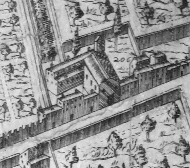 Pianta del buonsignori, dettaglio 206 la pietà delle Abbandonate (via Giusti)